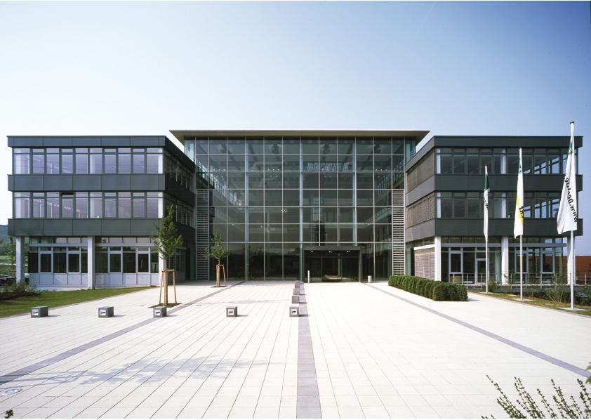 Le siège de Bechtle se situe à Neckarsulm, à Baden Württemberg en Allemagne.